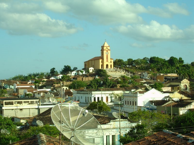 Vista de Borborema